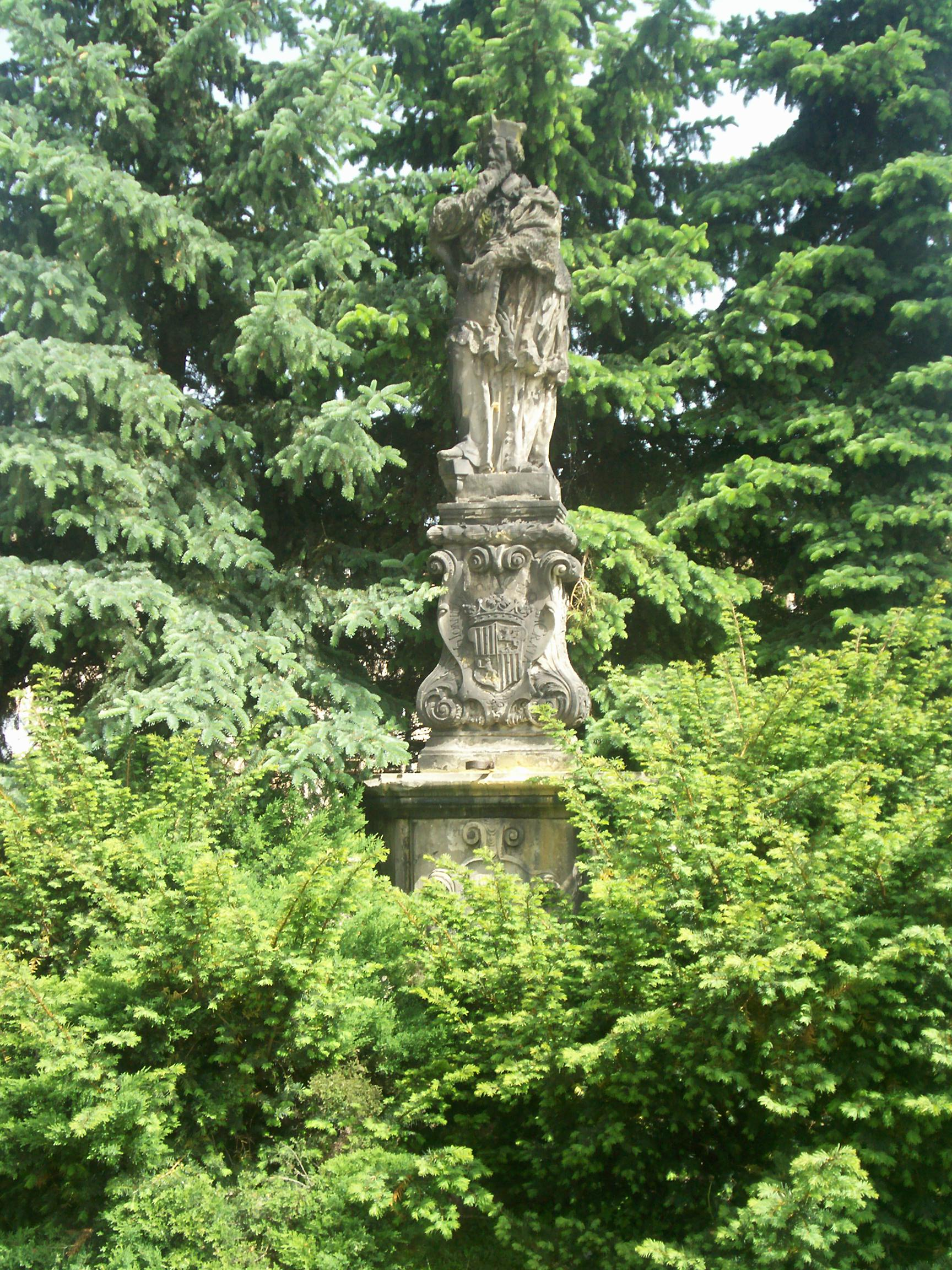 Cieplice Śląskie-Zdrój, figura św. Jan Nepomucena.